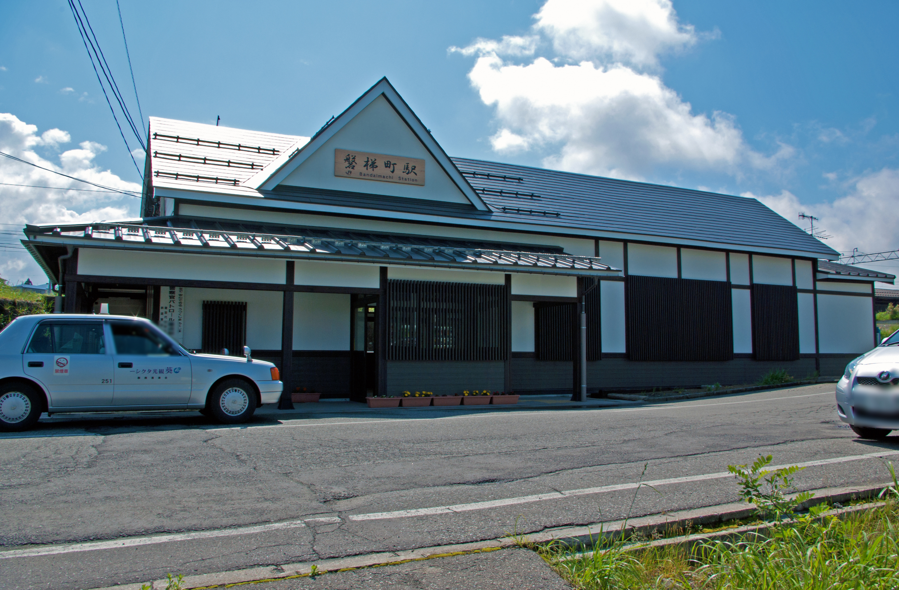 東日本旅客鉄道株式会社磐越西線磐梯町駅